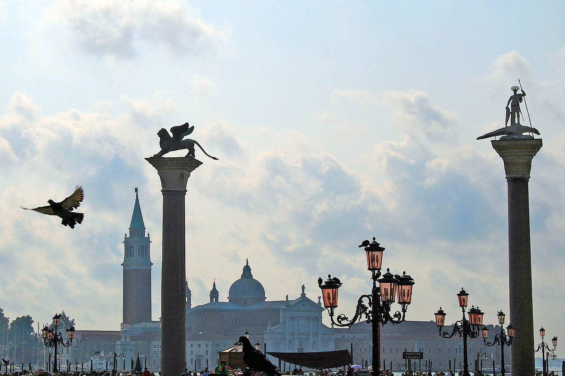 Desde Plaza San Marco